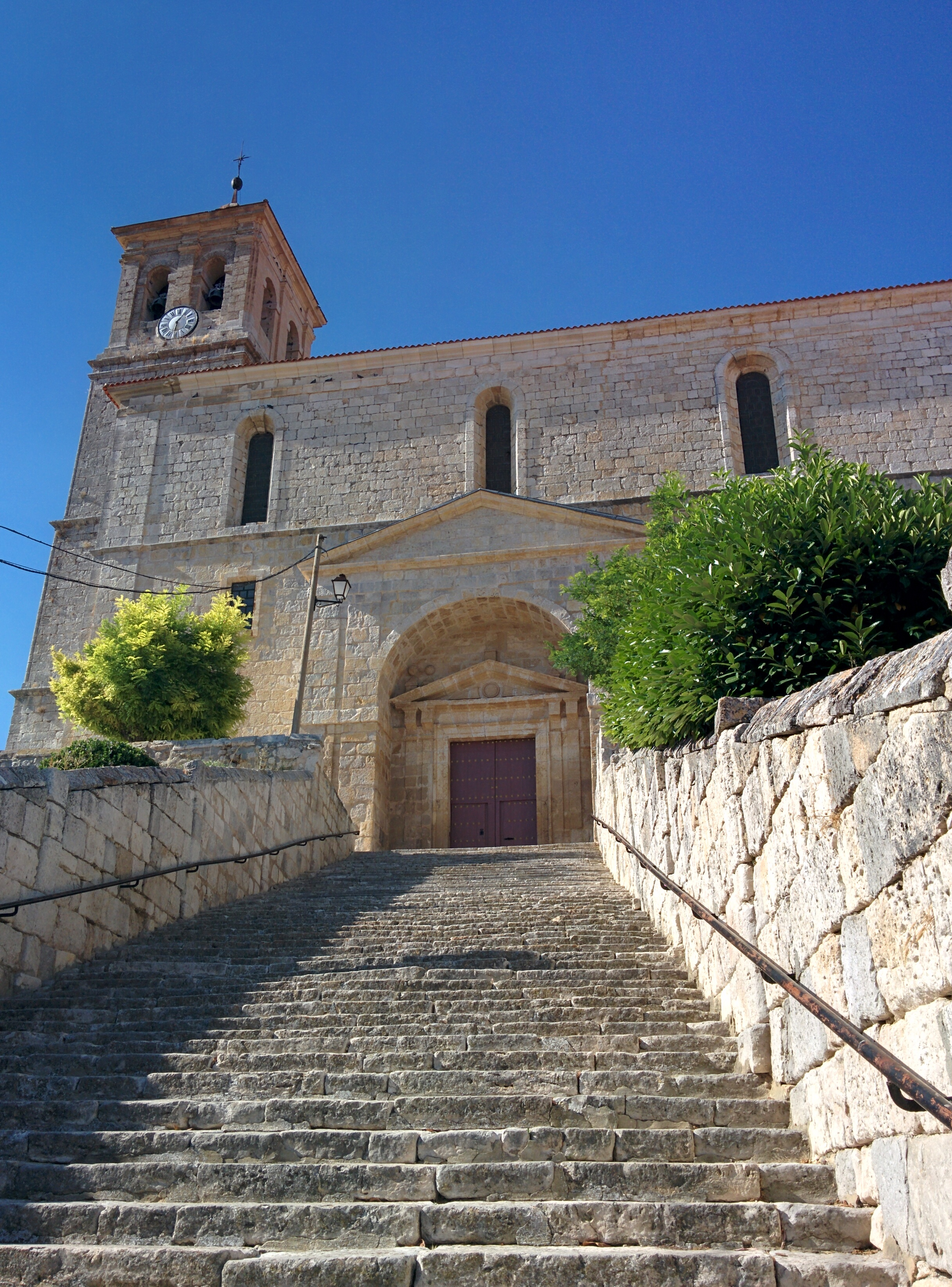 Iglesia de San Martín, en Cevico de la Torre (Palencia, España).